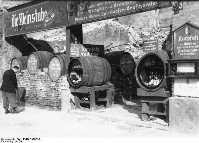 Weinfässer im Ruinengrundstück aufgebaut: So weist ein findiger Wirt den Berliner auf seine Weinstube hin.